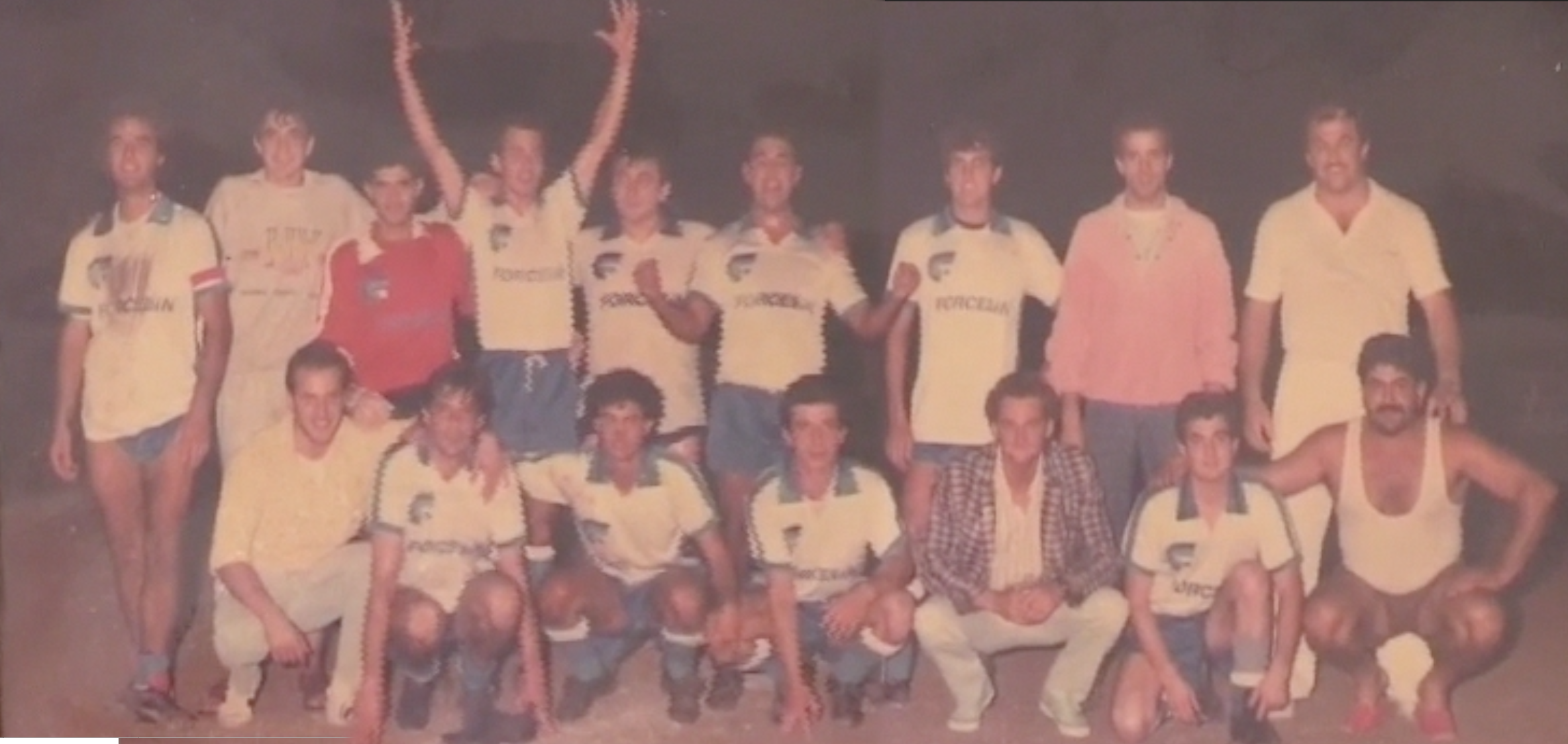 Una delle Prime comparizioni in Coppa Titano